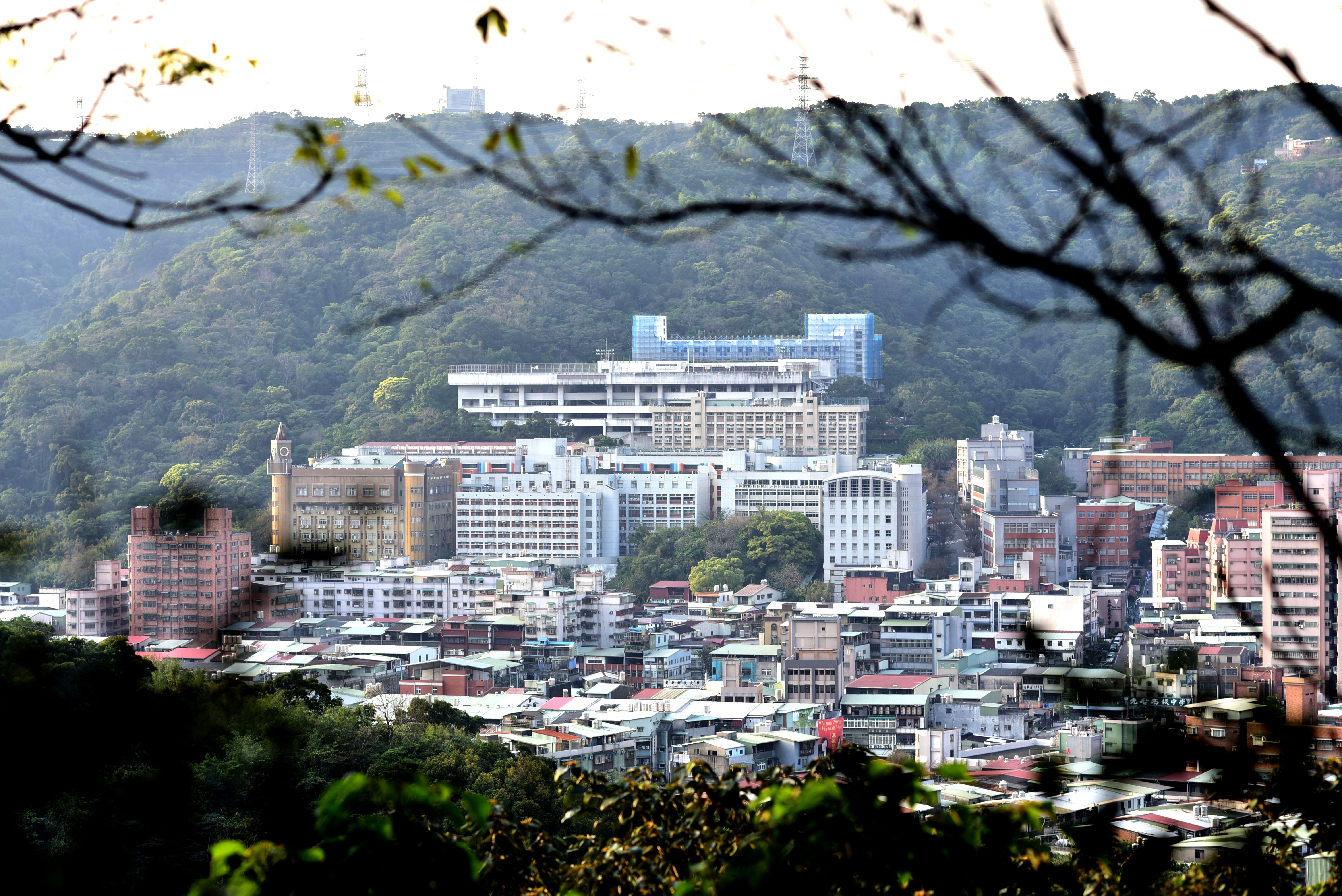 Lunghwa University of Science and Technology2018mars